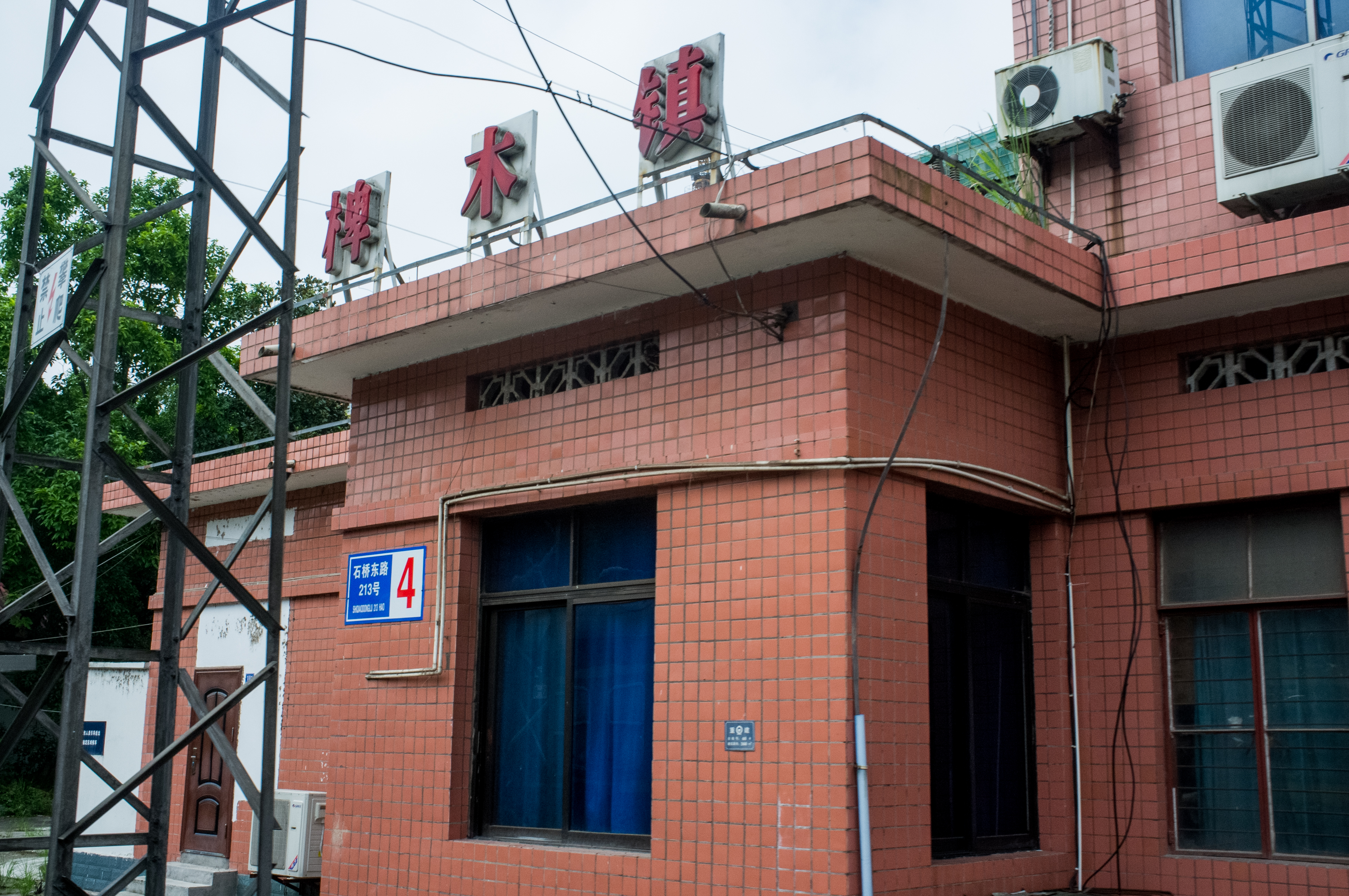 中文（中国大陆）: 成渝铁路椑木镇站